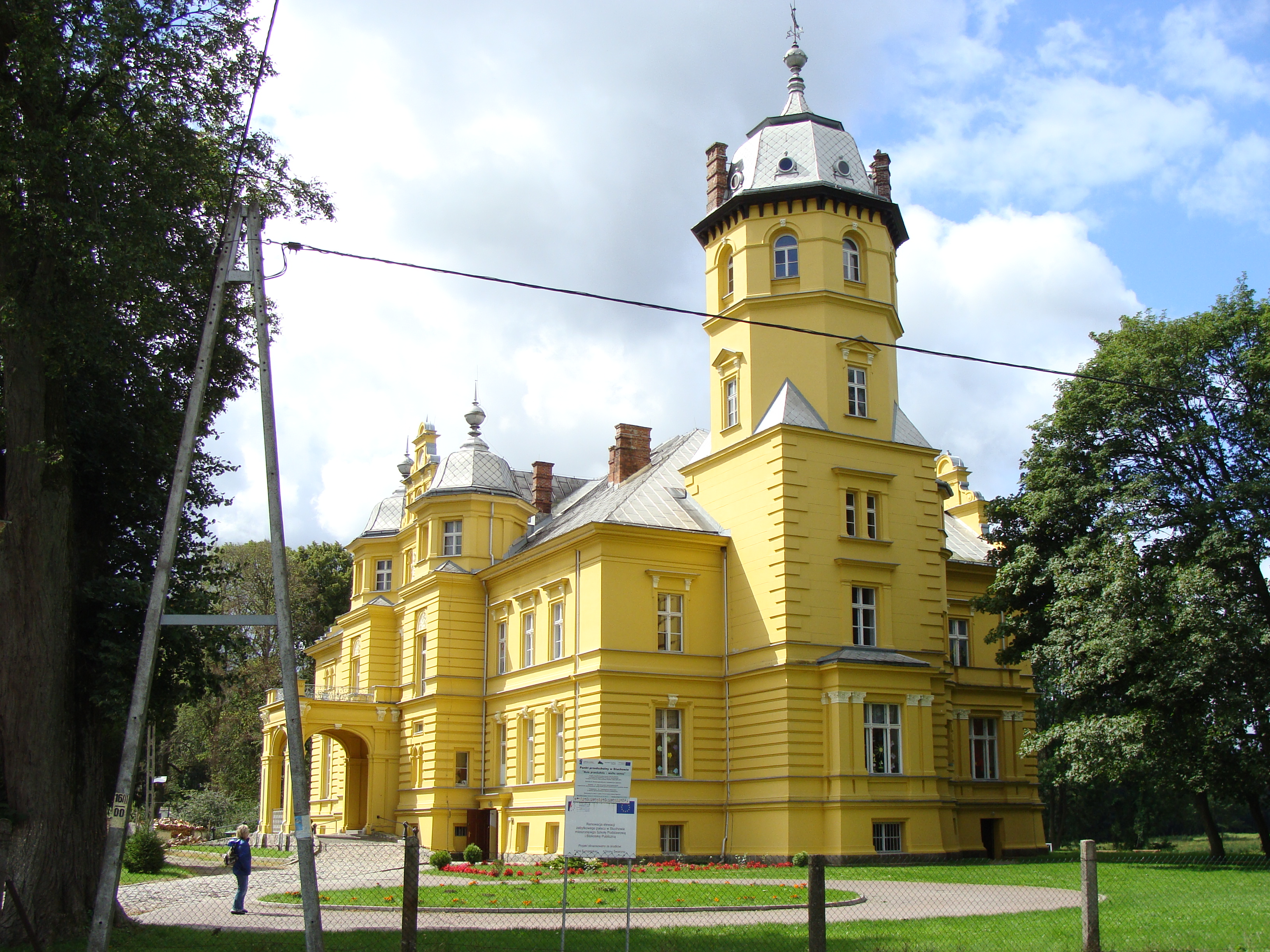 Stuchowo - dawny pałac von Plötzów, obecnie budynek szkoły podstawowej